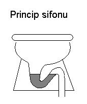 řez nádobou se sifonem - klozet